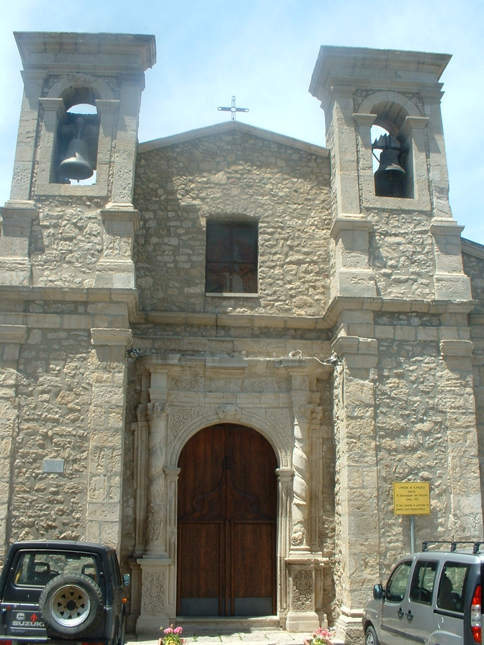 Gangi (PA), Chiesa di San Paolo (XVI sec.)